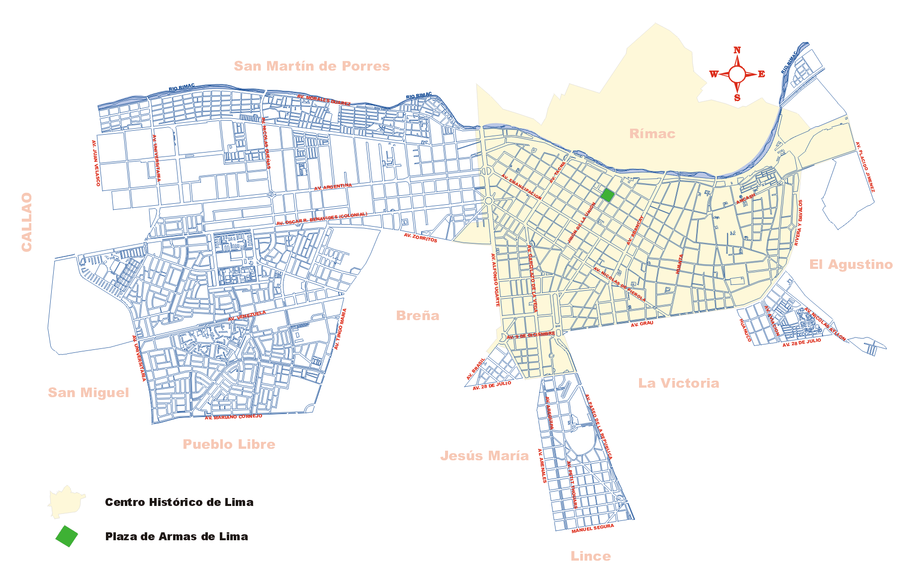 Mapa del distrito de Lima La imagen:Distrito de Lima 1.png, ha sido elaborada por --Edgardo Reyes 23:14 15 feb, 2005 (CET) Categoría:Mapas del Perú (imagen)